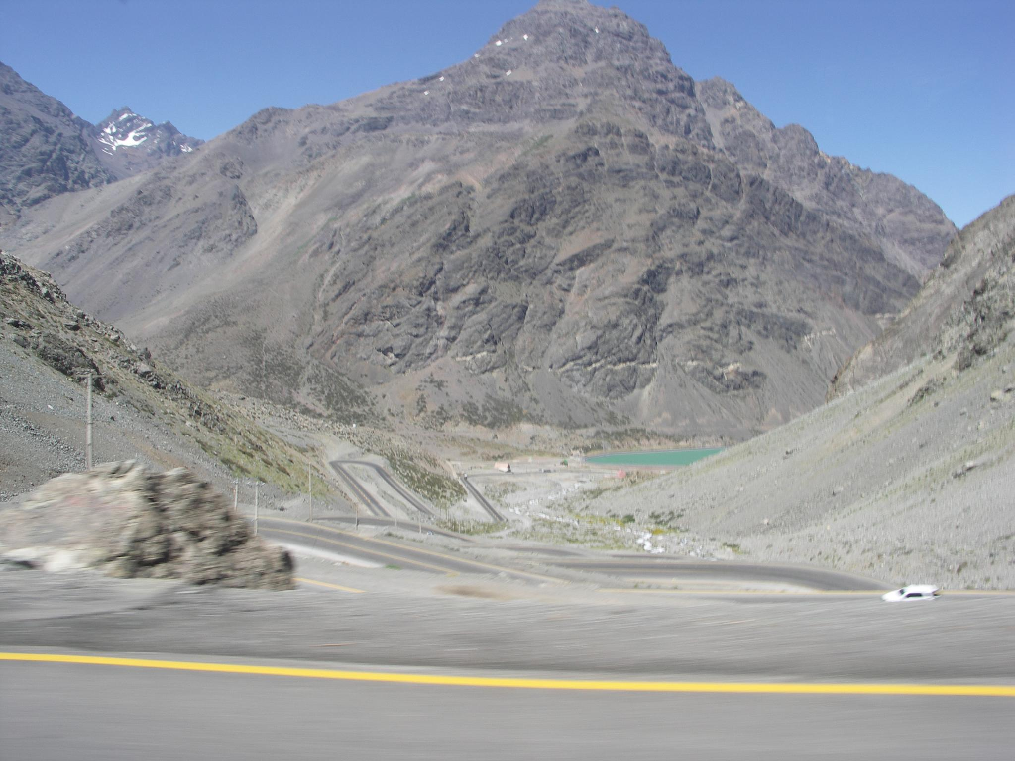 Bus ride from Santiago de Chile to Mendoza, Argentina